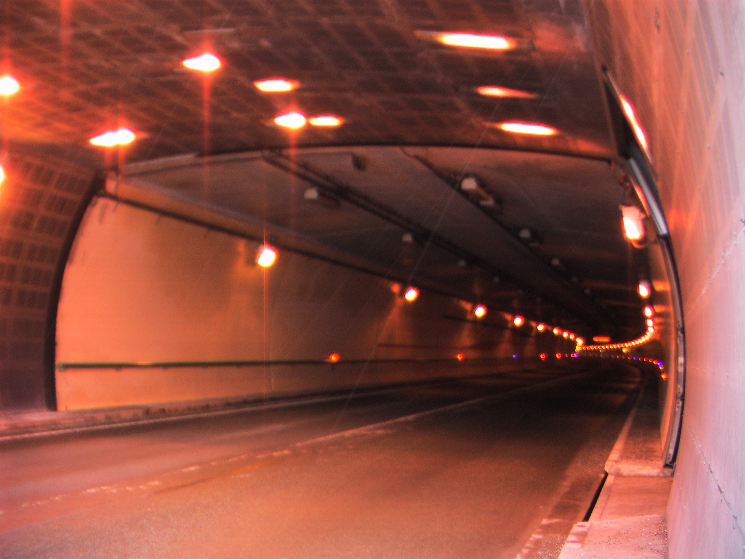 Tunnel du Somport le 16 mai 2010 depuis le côté français.